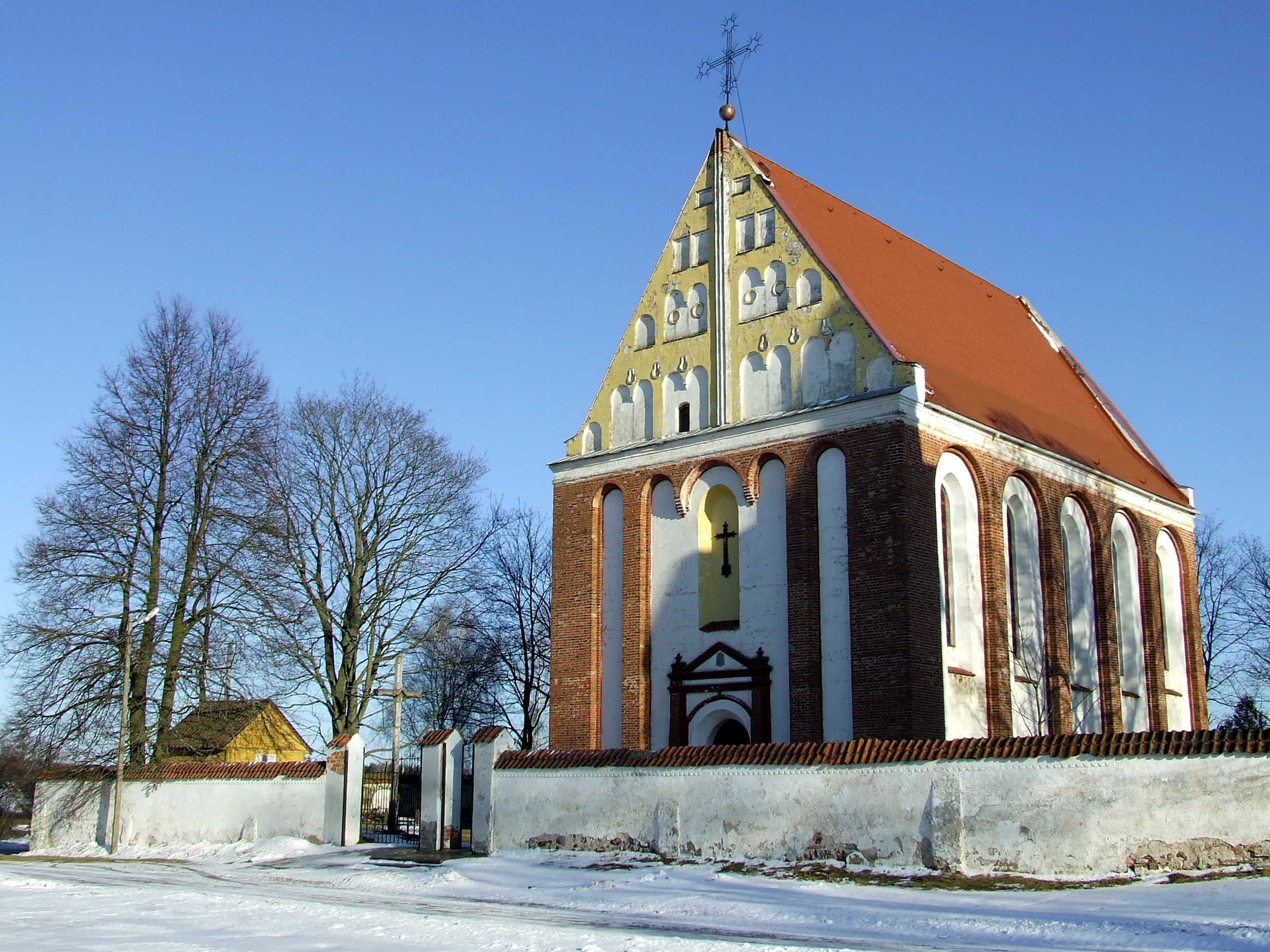 Šv. Onos church, Skaruliai, Lithuania.